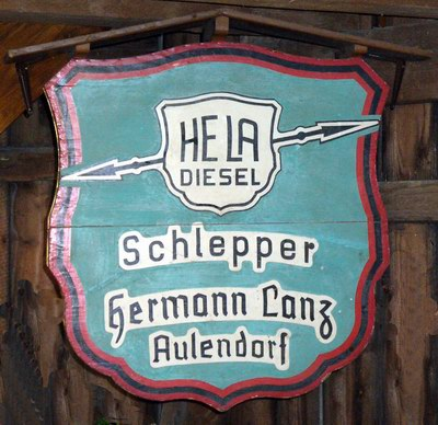 Schild Hermann Lanz Aulendorf Dieseltraktor, Kreisfreilichtmuseum Bad Schussenried-Kürnbach